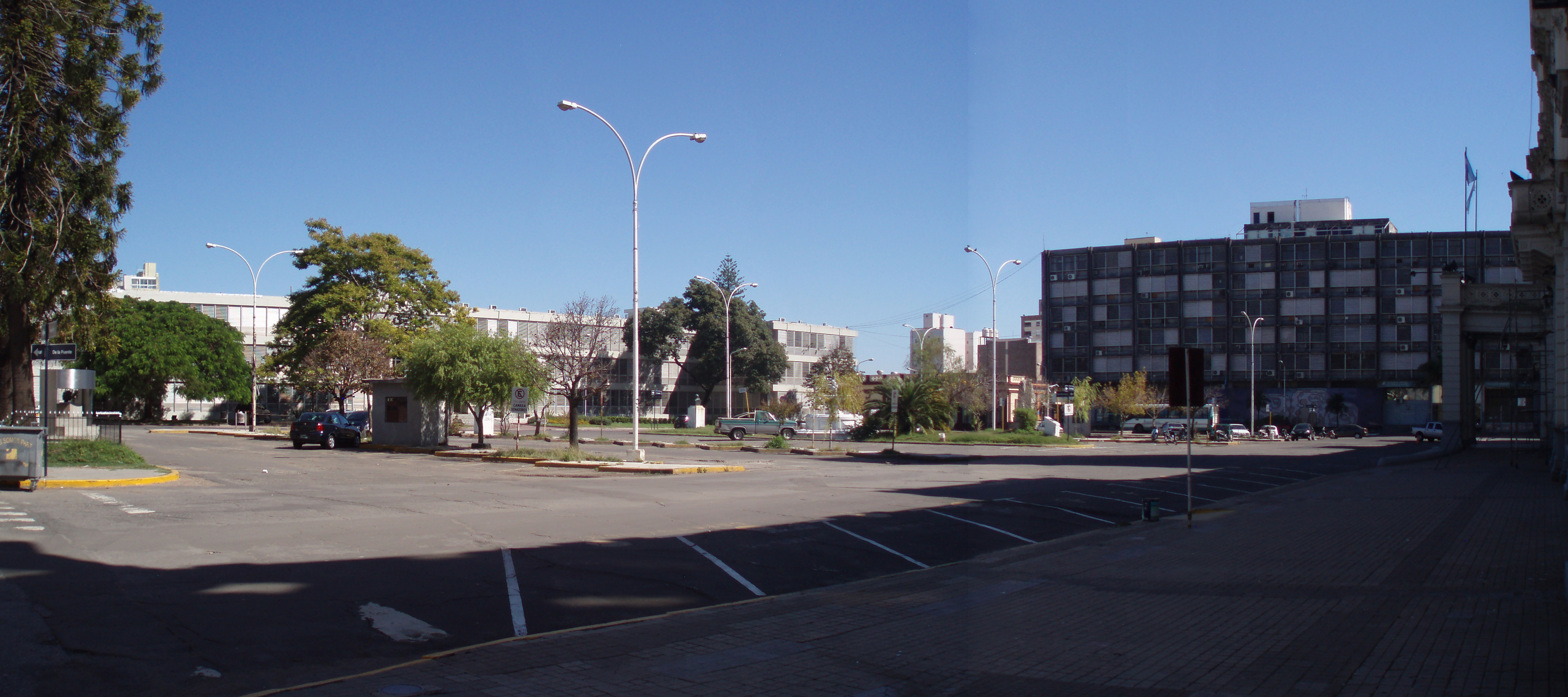 Vista panorámica de la Plaza Mansilla en Paraná, Entre Ríos. A la izquierda, el Poder Judicial de la Provincia. A la derecha, el Consejo General de Educación.